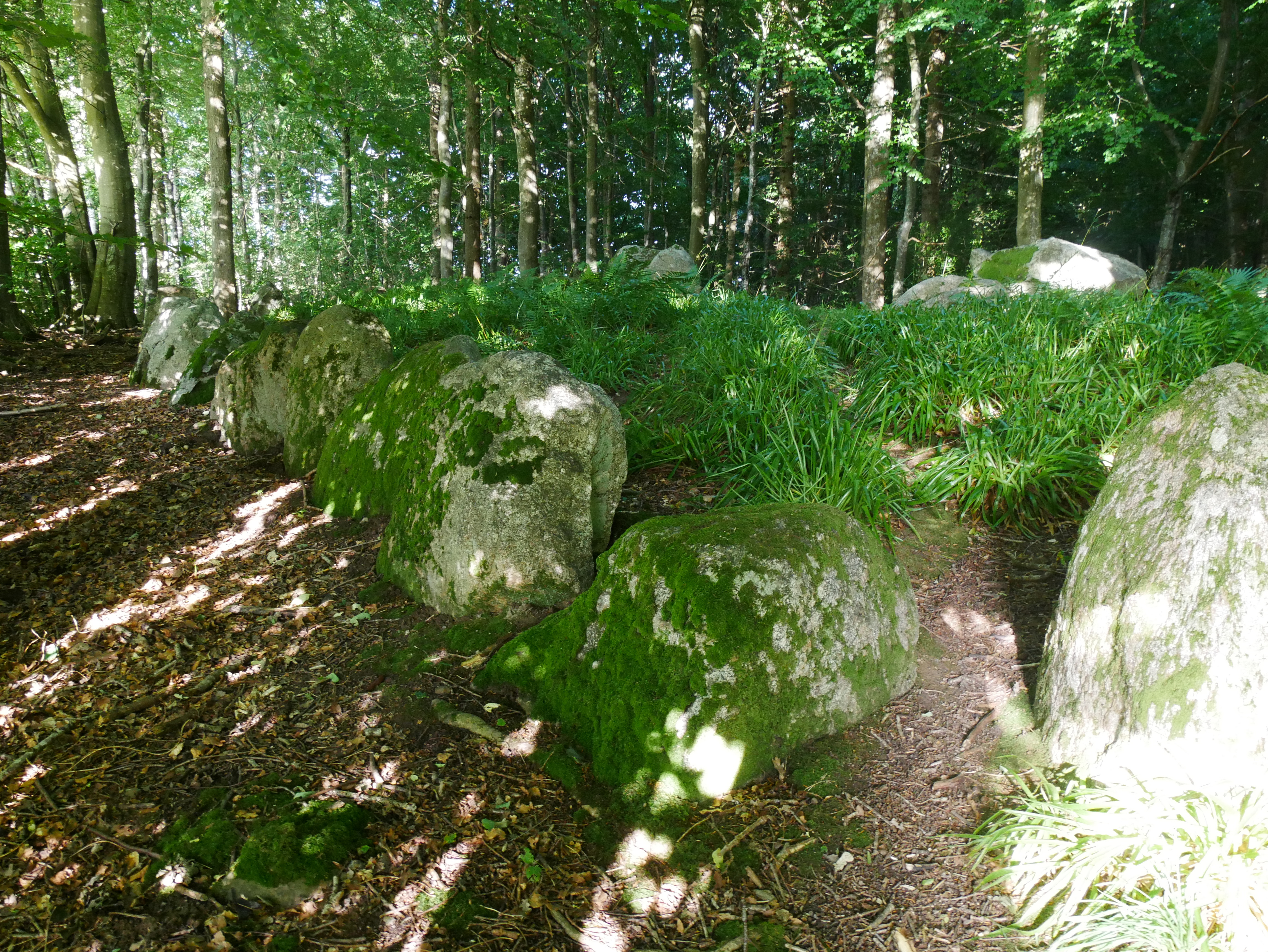 Der Langdysse von Sønder Stenderup (auch Midtskov Afdl. 82 genannt) liegt im Midtskov (mittlerer Wald), östlich von Kolding in Jütland in Dänemark. Er stammt aus der Jungsteinzeit etwa 3500 bis 2800 v. Chr. und ist eine Megalithanlage der Trichterbecherkultur (TBK). Das etwa einen Meter hohe Nordwest-Südost orientierte Hünenbett des Langdysse mit zwei querliegenden, 1942 restaurierten Dolmenkammern ist etwa 21,0 m lang und 9,0 m breit. Die Randsteine (38) sind nahezu vollständig erhalten. Die Kammern haben beide die gleiche Form. Ein Endstein im Norden, zwei seitliche Tragsteine im Osten und Westen, zwei Gangsteinpaare (ohne Decksteine) und ein Deckstein auf der Kammer.